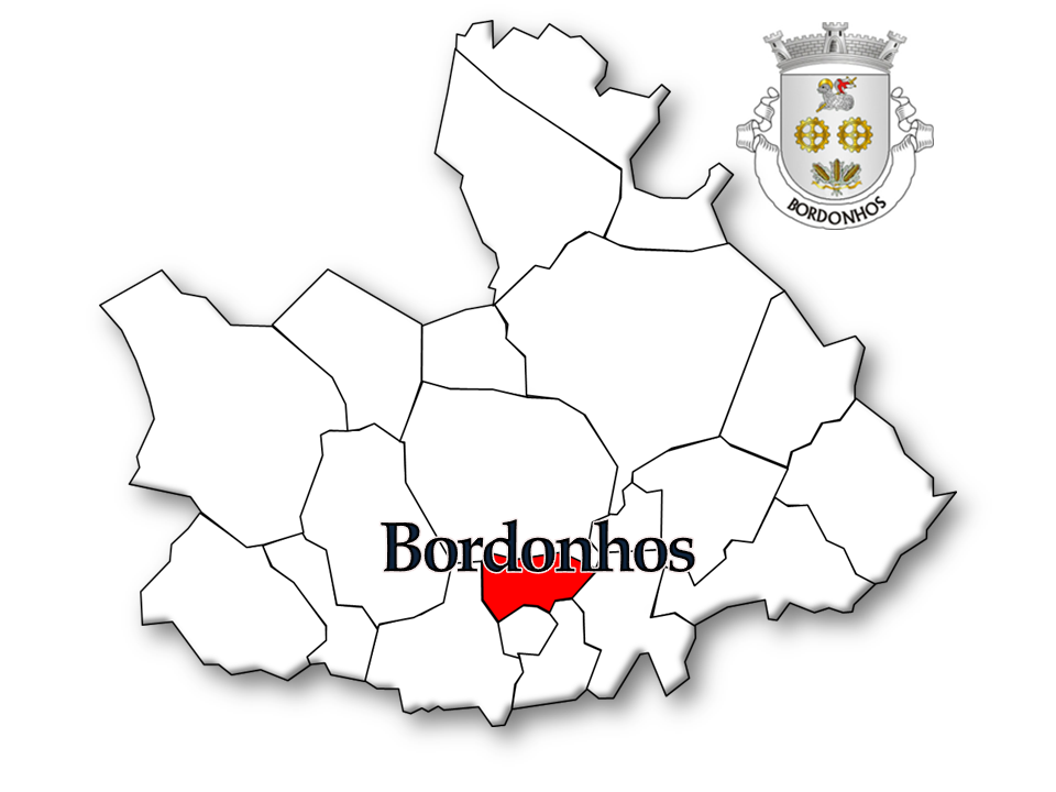 Mapa das Freguesias